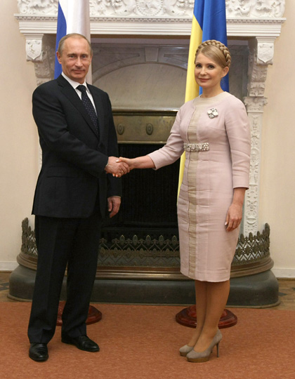 В.В.Путин, находящийся с рабочим визитом на Украине, встретился в Ялте с Премьер-министром Украины Ю.В.Тимошенко